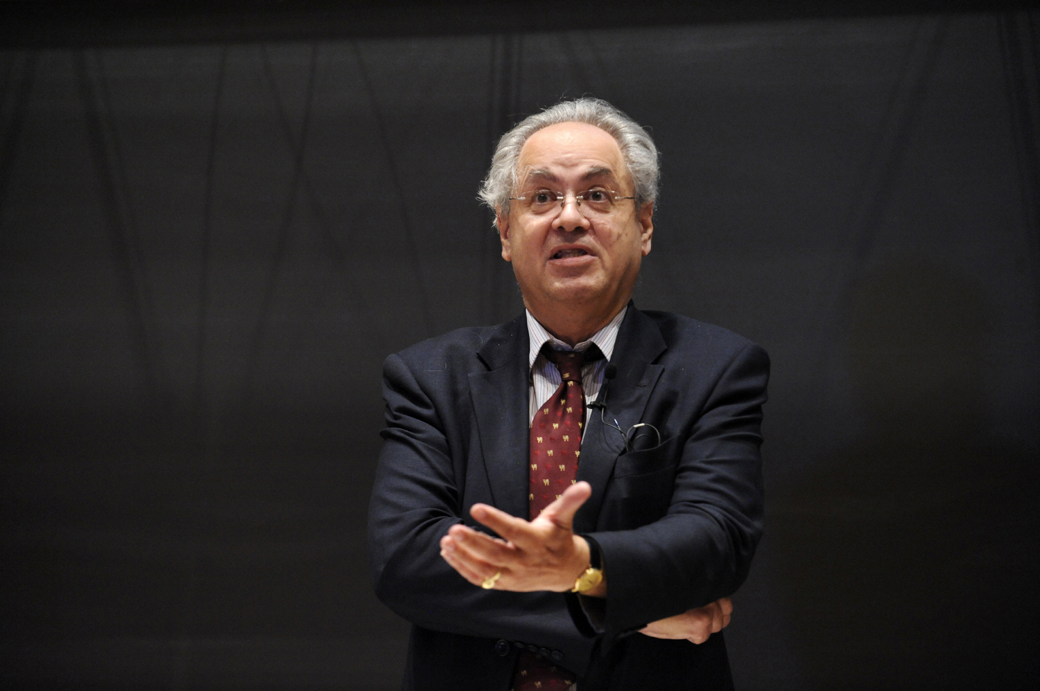 Holbergprisen symposium.. David Abulafia.. Foto: Marit Hommedal / SCANPIX / Holbergprisen